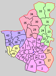 熊本県玉名郡の町村制時点の町村。